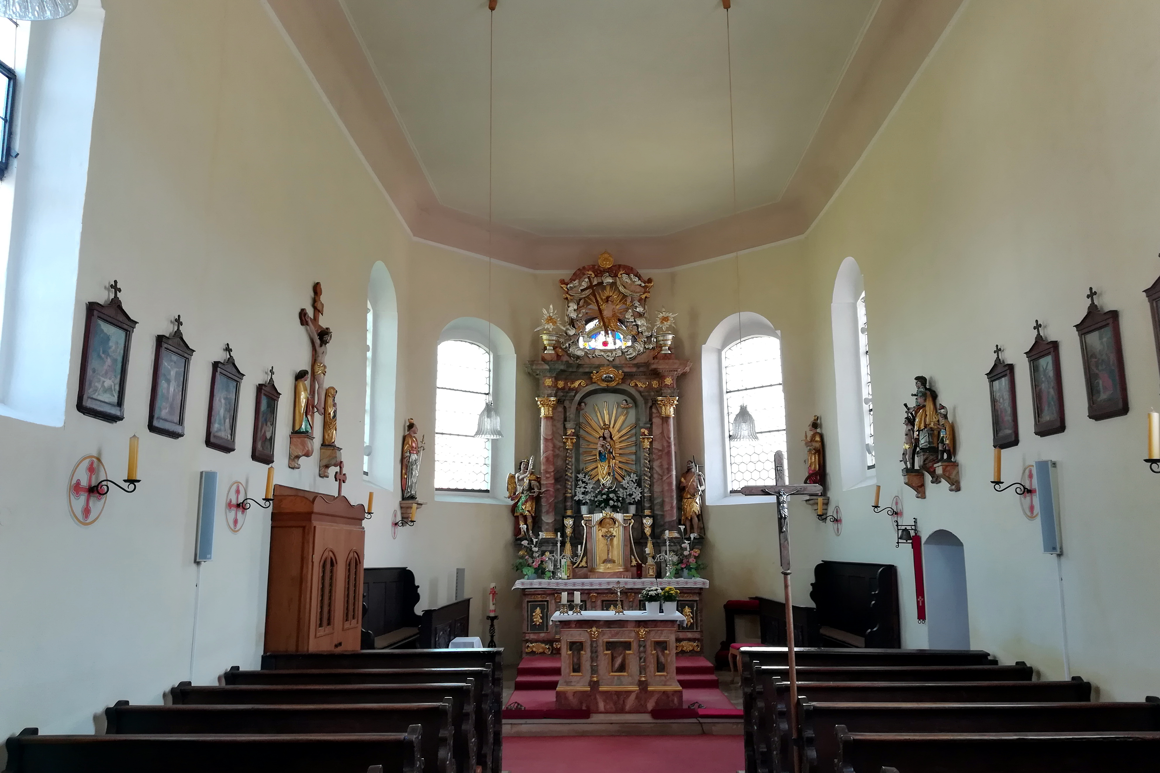 Katholische Kirche Mariä Namen in Meilenhofen.